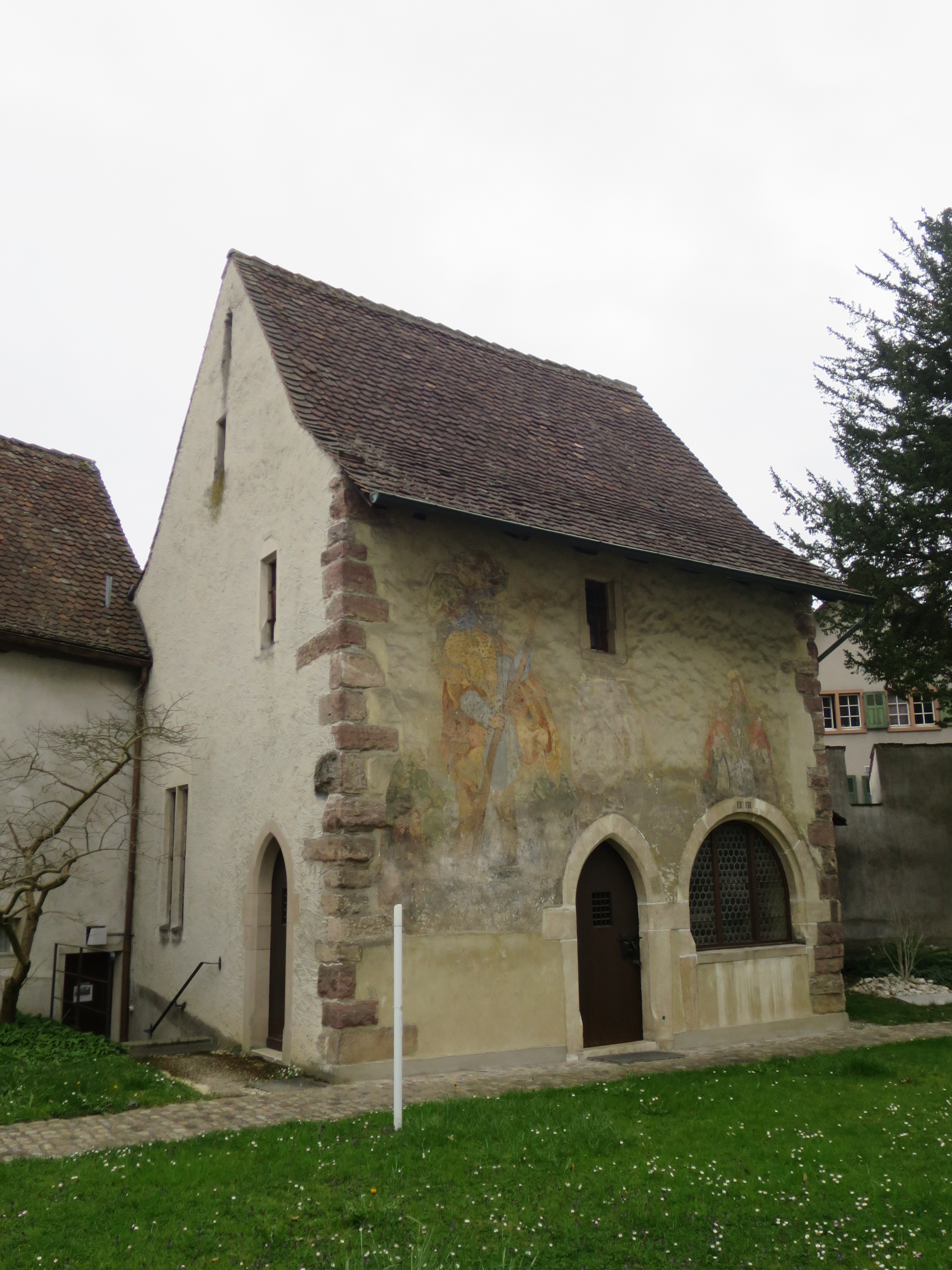 Reformierte Kirche St. Argobast, Muttenz BL, Schweiz, Beinhaus